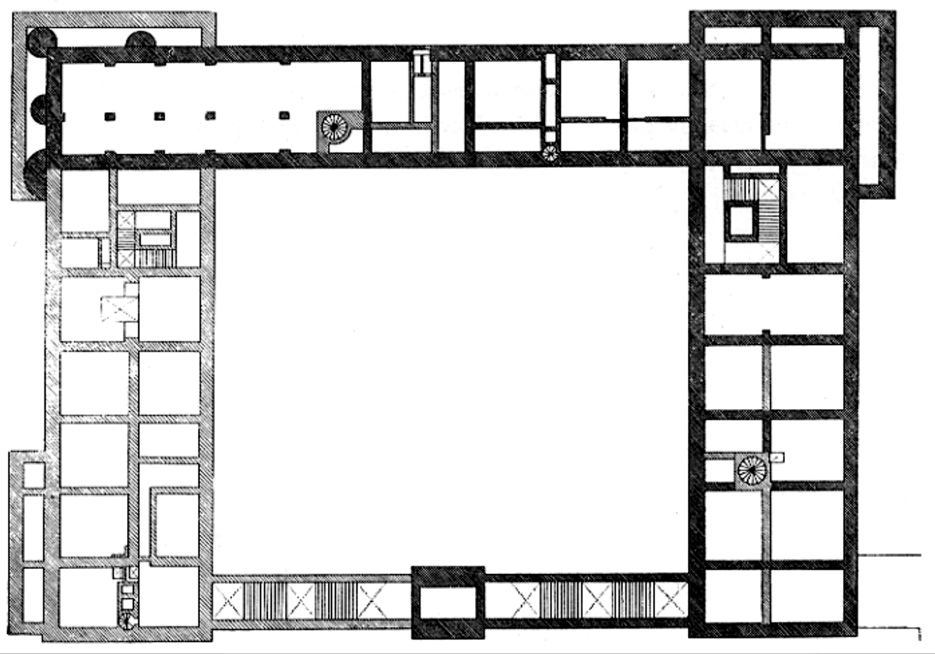 Roudnice nad Labem – plán zámku podle náčrtku Antonio della Porty